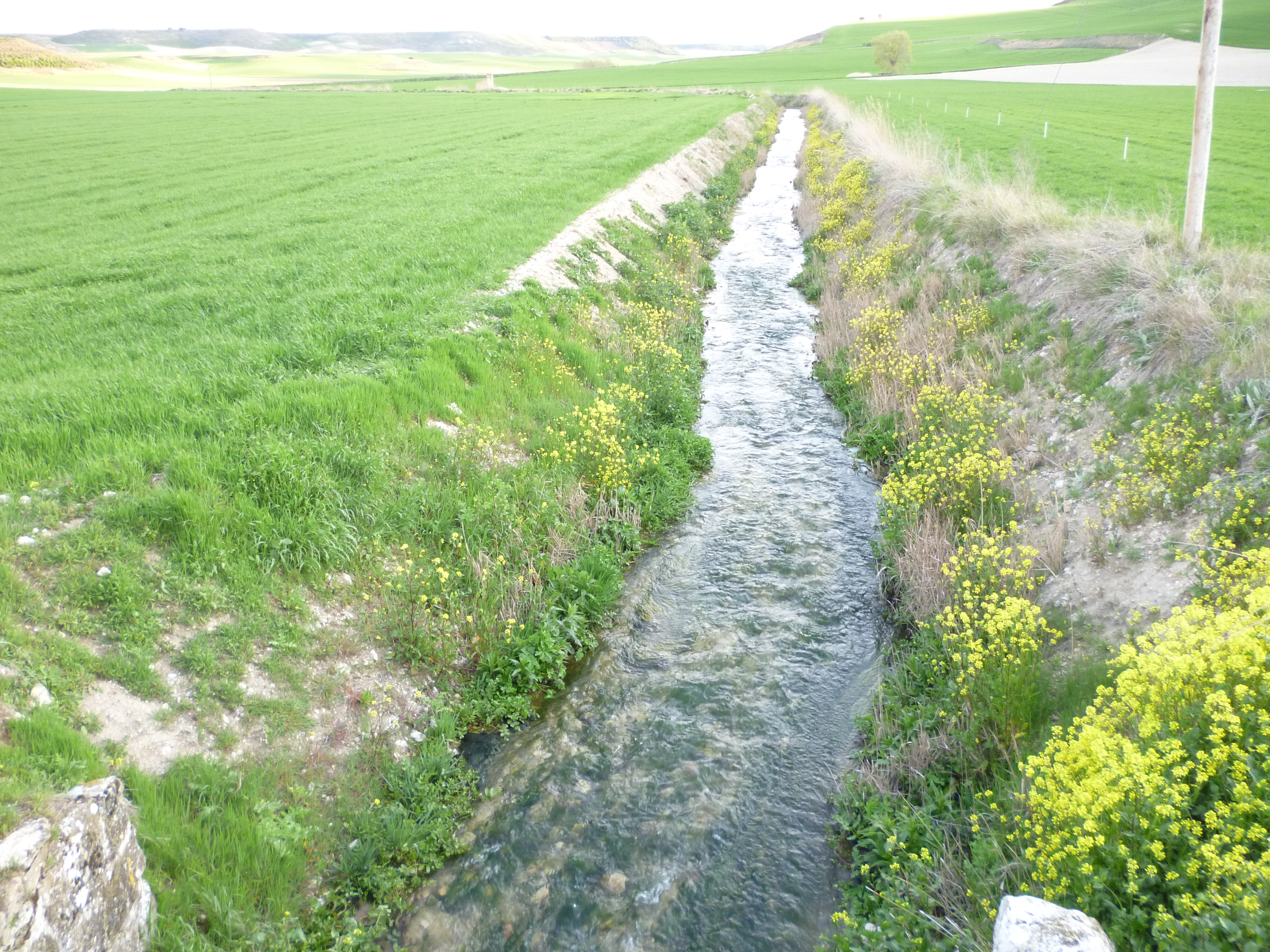 Arroyo Jaramiel en Villavaquerín